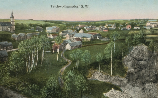 Teichwolframsdorf um 1909 Text in image: Teichwolframsdorf S[achsen]. W[eimar].